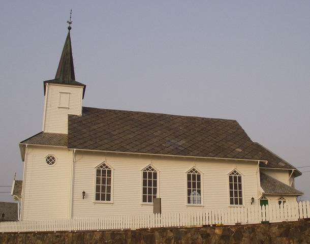 Lygra kyrkje i Lindås kommune